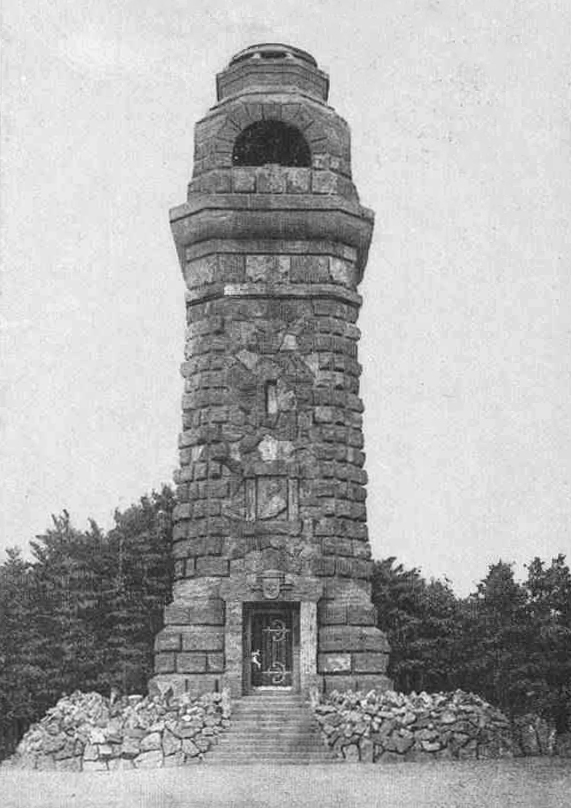 Bismarckturm in Porta Westfalica (1952 abgerissen), Postkarte ca. 1910